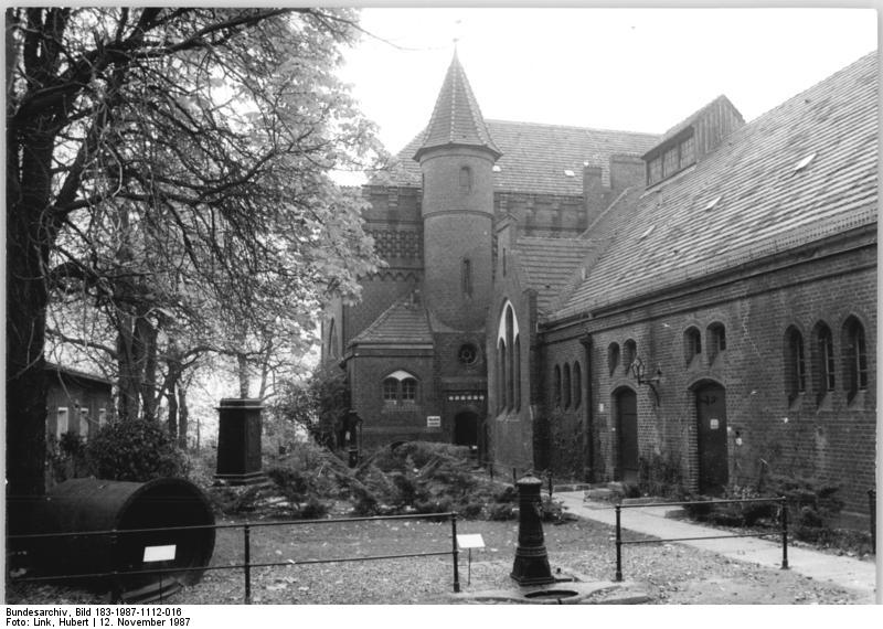 Berlin, Wasserwerk Friedrichshagen ADN-ZB Link 12.11.87 Berlin: Wasserwerk Friedrichshagen - Das 1979 stillgelegte Schöpfmaschinenhaus des ehemals größten und modernsten Wasserwerks Europas wurde nach umfangreicher Rekonstruktion als Technisches Denkmal der Öffentlichkeit übergeben. Das Wasserwerk Friedrichshagen war 1889 bis 1893 am Nordufer des Müggelsees unter Beteiligung englischer Spezialisten ervaut worden. Die Hochbauten in märkisch-.gotischen Landhausstil. (s. auch Nr. 1987-1112-17 bis 20!)